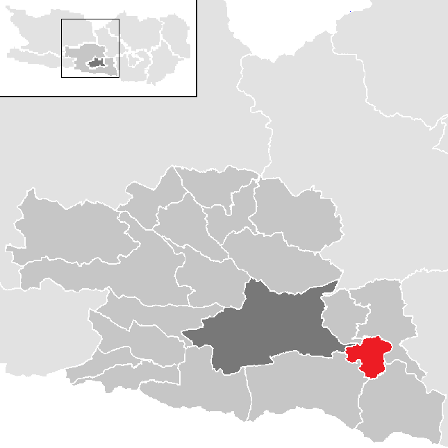 Bezirk Villach-Land